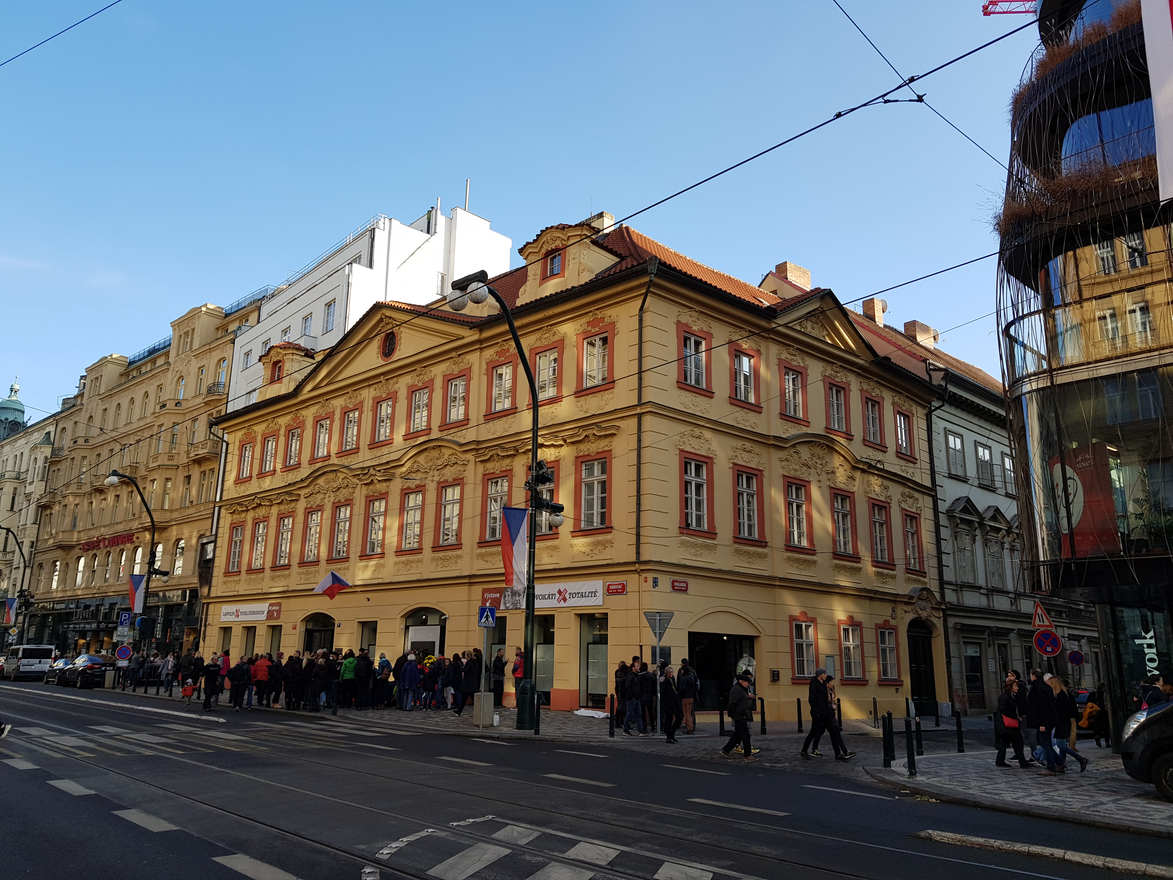 Kaňkův dům (Schirdingovský palác), Národní třída čp. 118/16 v Praze-Novém Městě